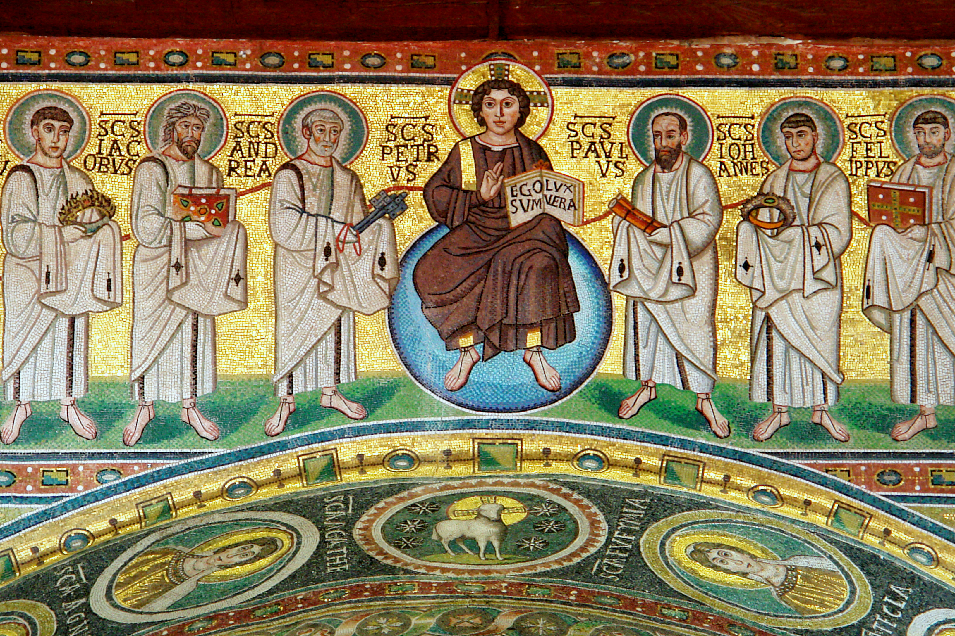 Szent Euphrasius-bazilika, mozaikok (Z-2432 Poreč Kompleks Eufrazijeve bazilike) This is a a photo of a cultural heritage in Croatia with ID: Z-2432